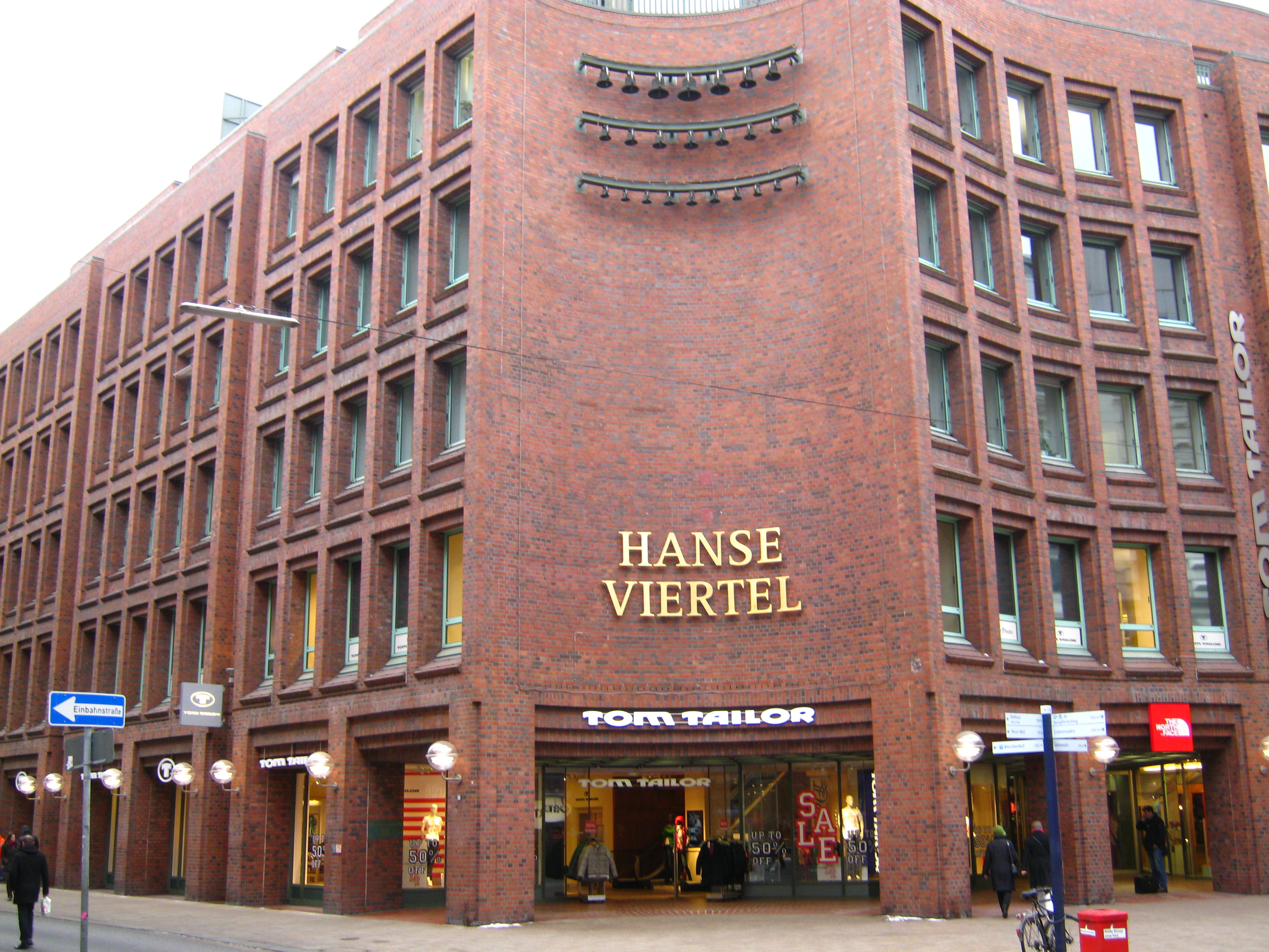 Die Einkaufspassage Hanse-Viertel liegt im Passagenviertel in Hamburg-Neustadt.